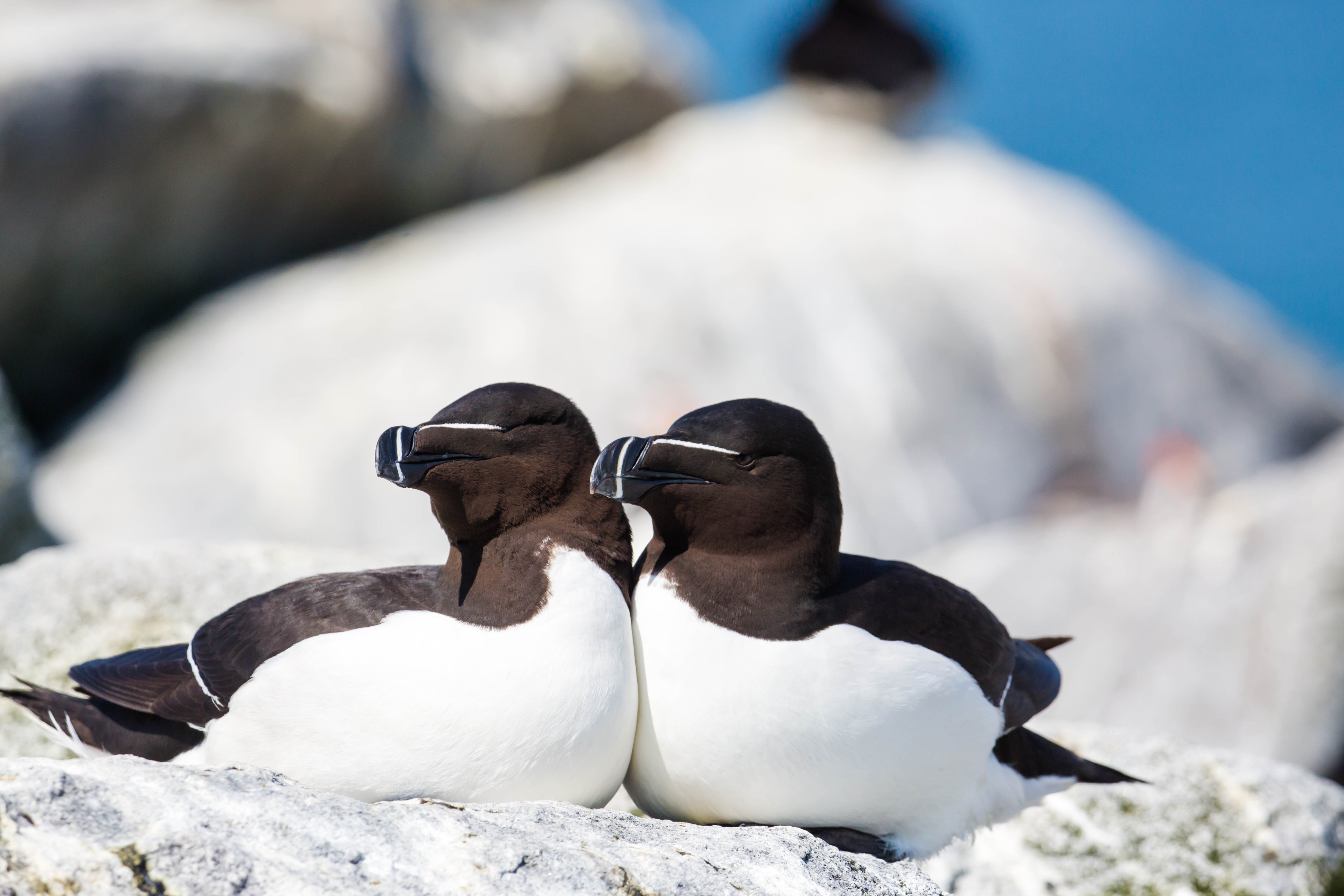 Razorbill